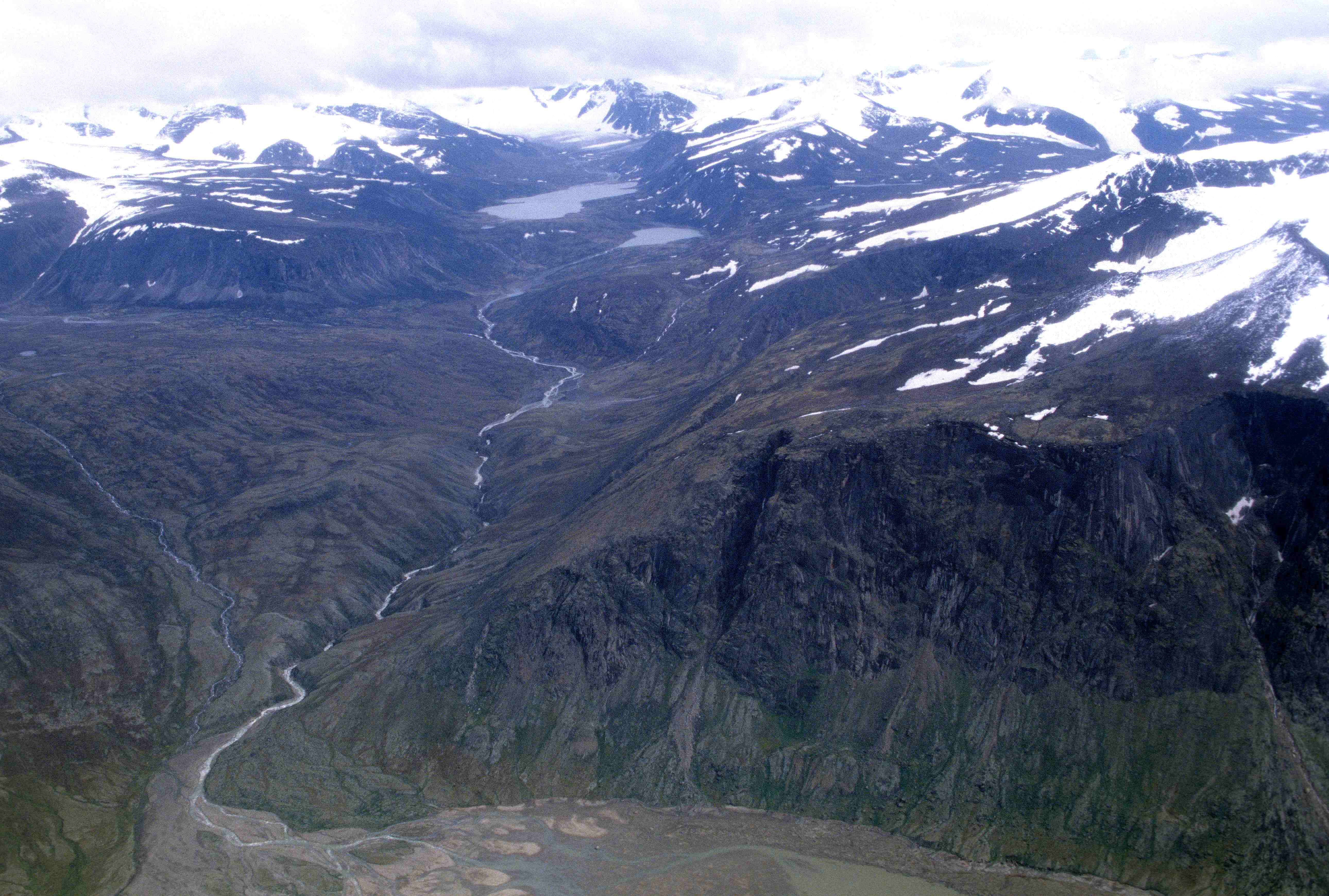 Auyuittuq National Park: Qijuttaaqanngittuq Valley